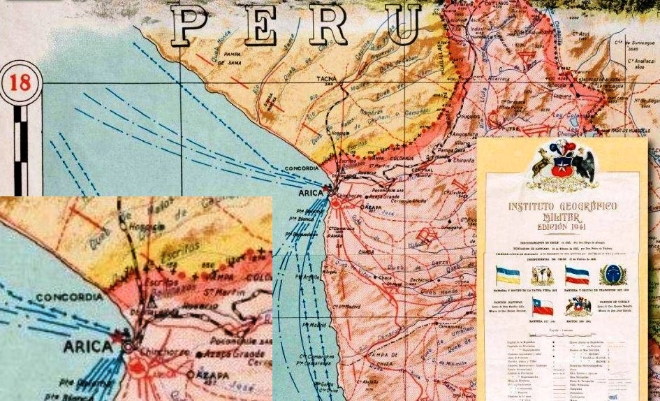 Mapa de Arica publicado por el Instituto Geográfico Militar de Chile en 1941, con ampliación. Documento presentado por el Gobierno del Peru ante la Corte Internacional de Justicia en la Controversia Marítima (Perú v. Chile)